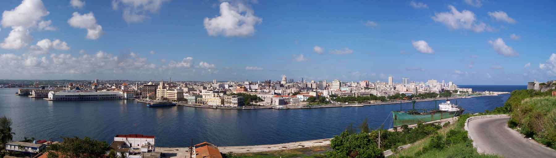 העיר מצידו השני של המפרץ.